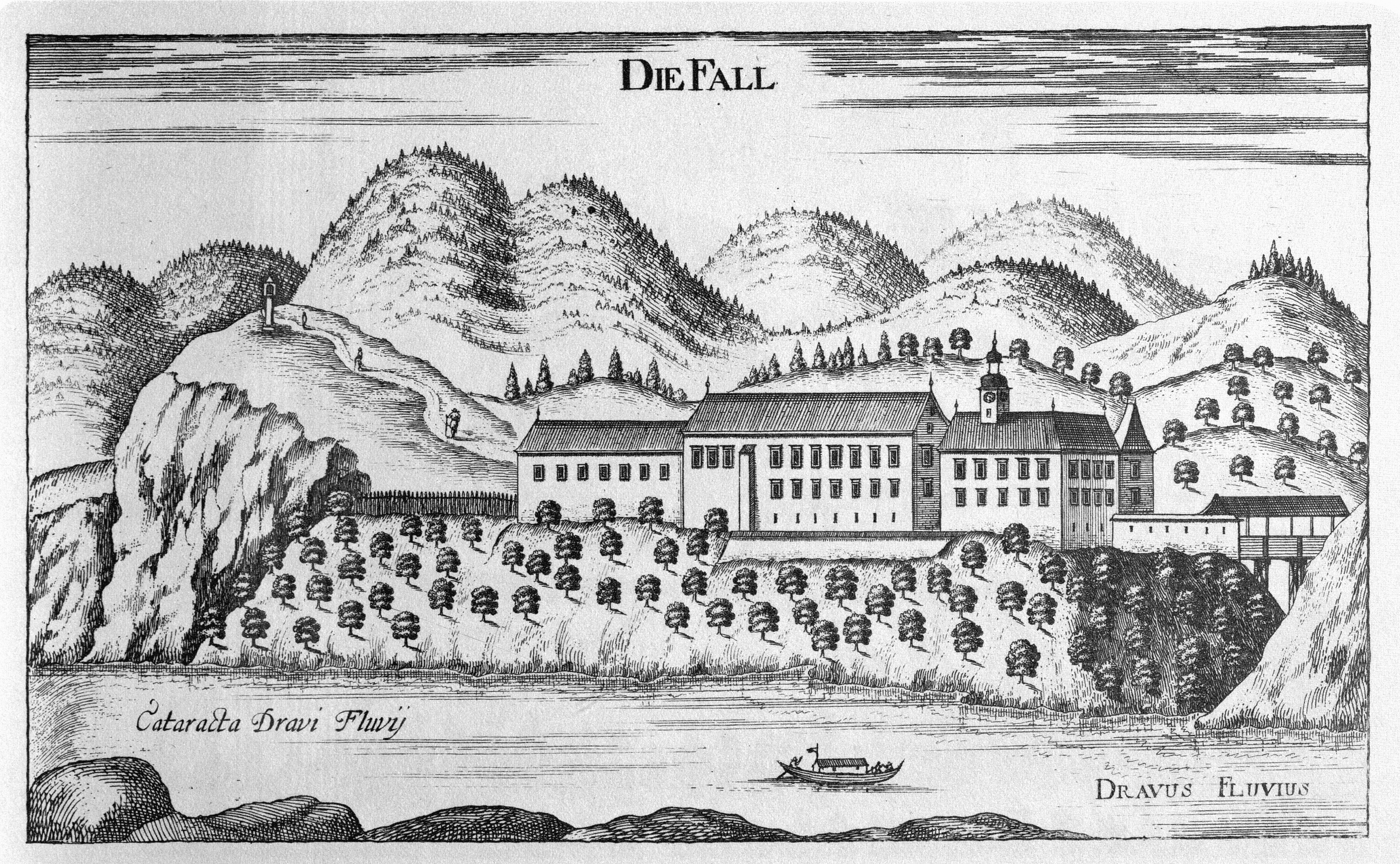 G. M. Vischers Käyserlichen Geographi, Topographia Ducatus Stiriae, Das ist: Eigentliche Delineation / und Abbildung aller Städte / Schlösser / Marcktfleck / Lustgärten / Probsteyen / Stiffter / Clöster und Kirchen / so es sich im Herzogthumb Steyrmarck befinden; Und anjetzo Umb einen billichen Preyß zu finden seynd Bey Johann Bitsch Universitäts Buchhandlern / Auff dem Juden=Platz bey der guldenen Saulen. Graz 1681 Die Nummerierung der Dateien folgt der alphabetischen Reihung der Orte